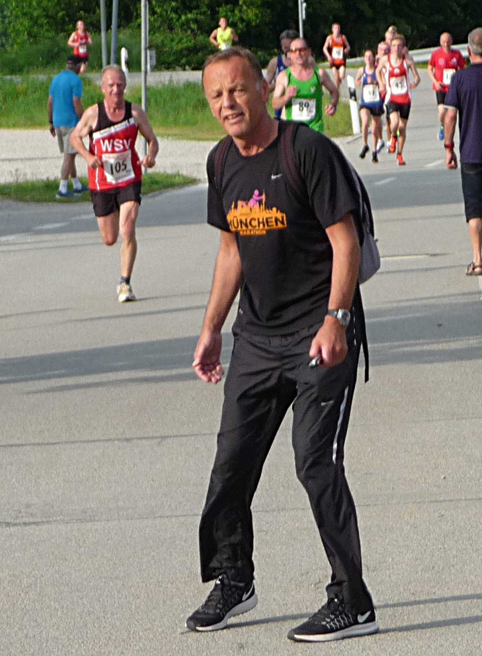 Trainer Günter Zahn bei den Bayer. 10 km Straßenlaufmeisterschaften 2016 in Ruhstorf an der Rott